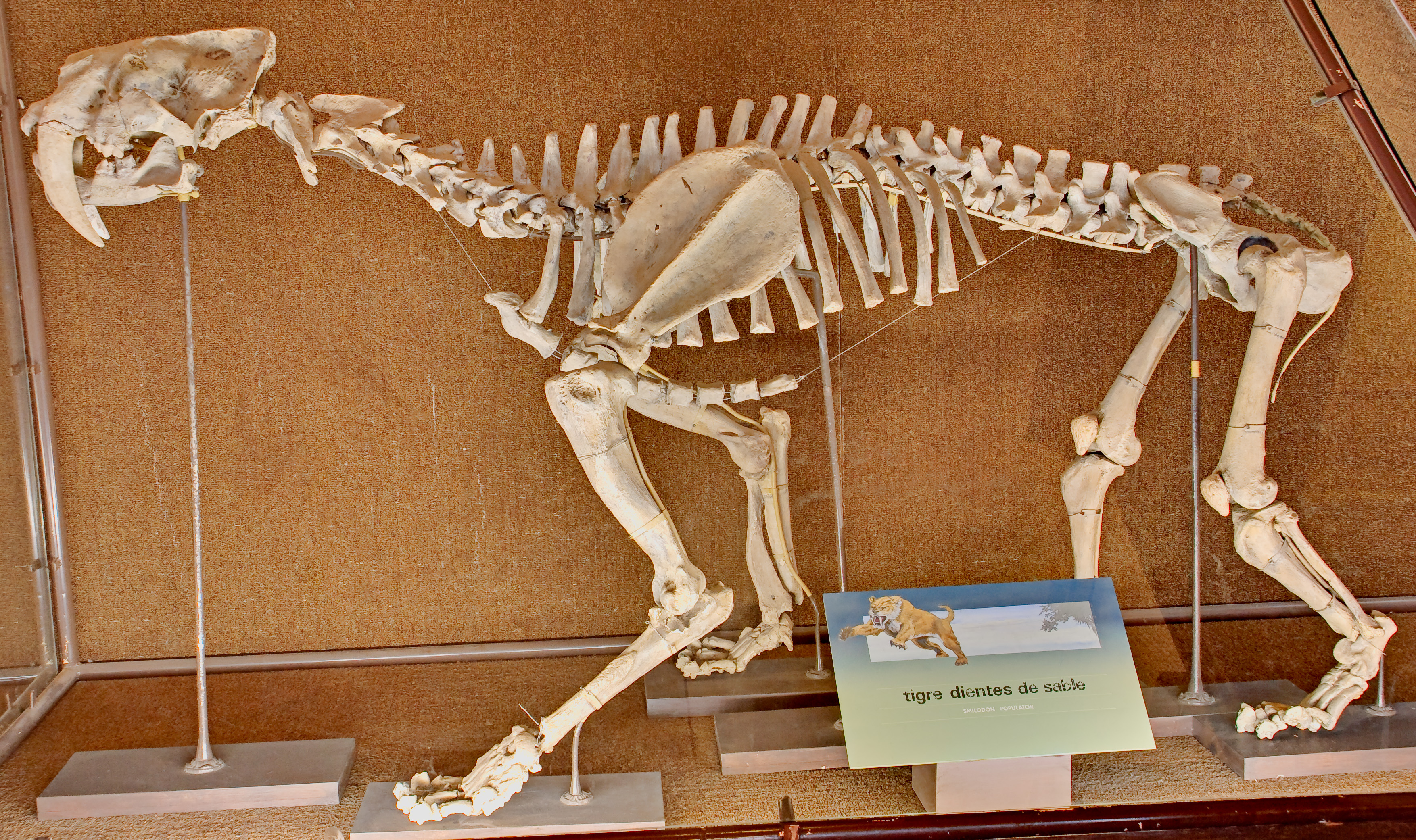 Foto del smilodon populator (Tigre dientes de sable).